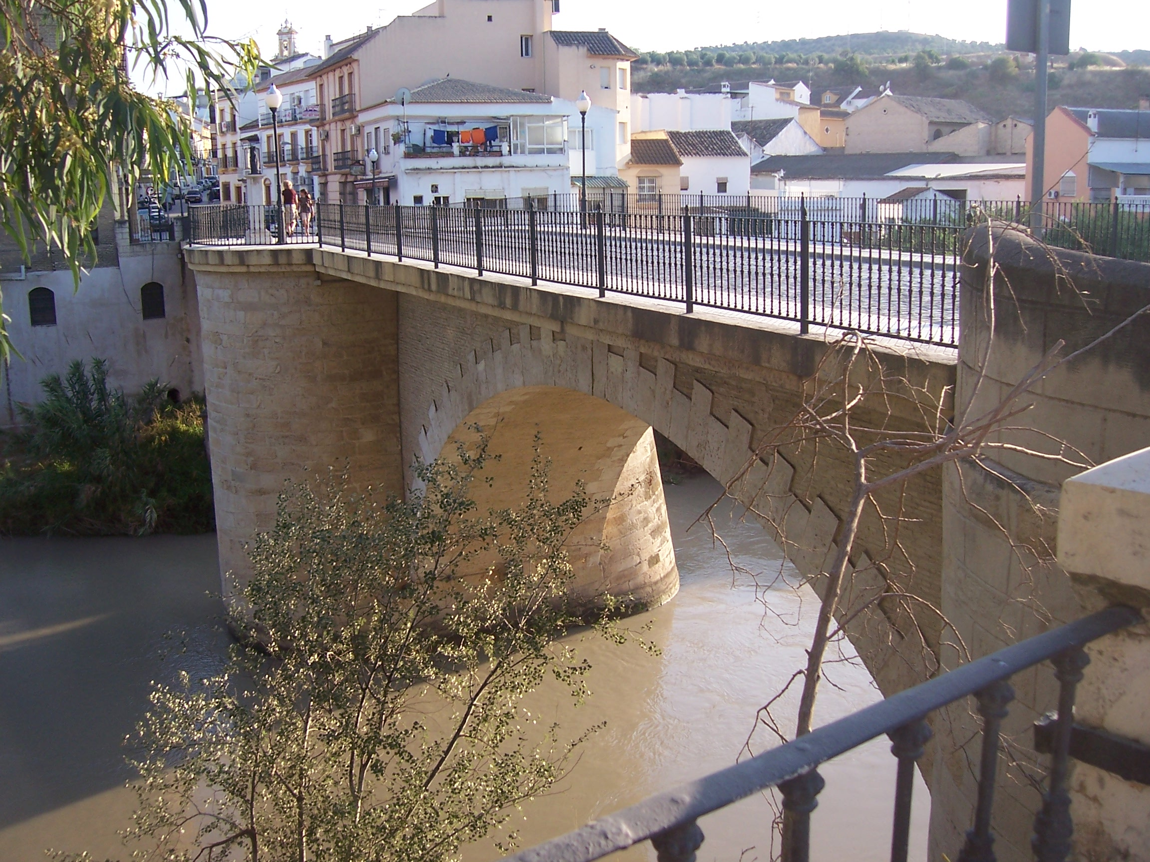 Puente sobre el río Genil, en Puente Genil (Córdoba, España)